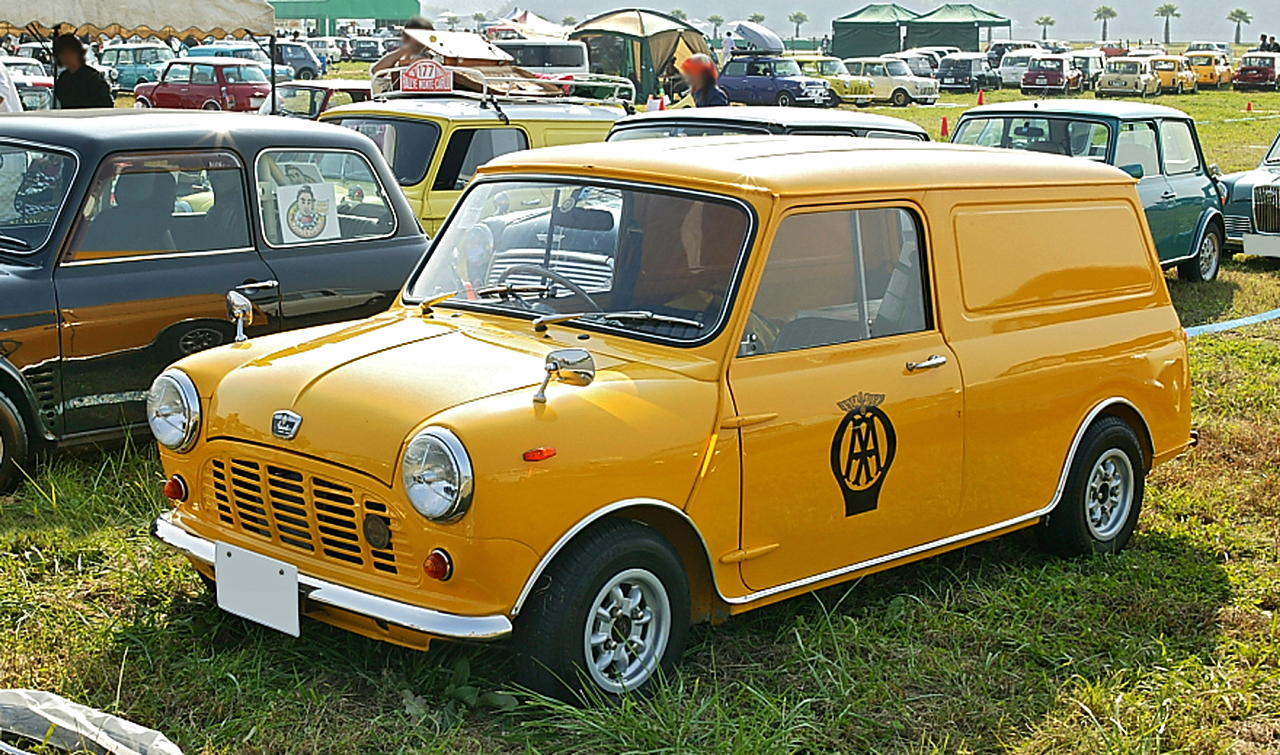 Austin Mini Van